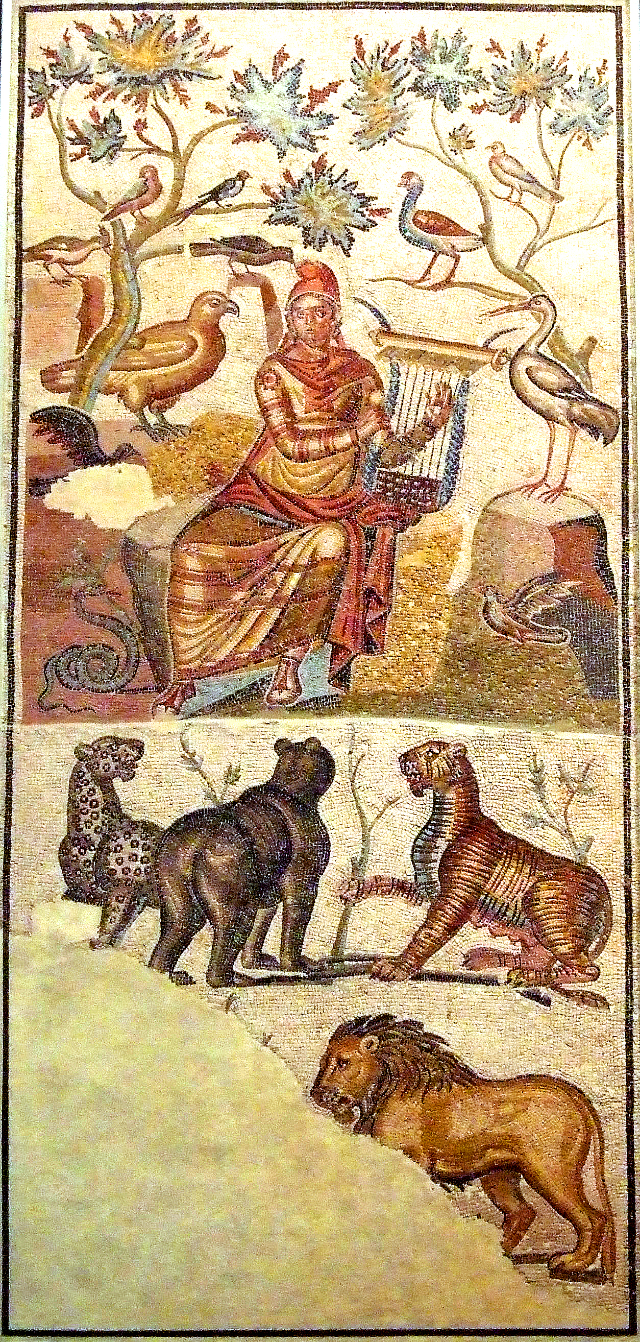 Mosaico de Orfeo, siglos II y III d. C. Polícromo. Pertenece a la llamada "Casa de Orfeo", que estaba situada junto a las murallas romanas cercanas al mercado central de Caesaraugusta. Museo de Zaragoza.